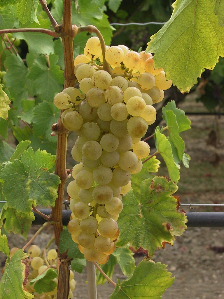 Grappe de la variété de raisin Chasselas B